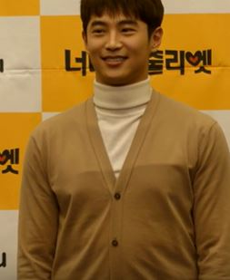 2019년 2월 8일 오후, 서울시 마포구 상암동 '스탠포드호텔 서울'에서 옥수수 오리지널 '너 미워! 줄리엣' 제작발표회가 열려 김정권PD, 배우 한상진, 최웅, 문수빈, 이홍기, 정혜성이 참석해 포즈를 취하고 있다